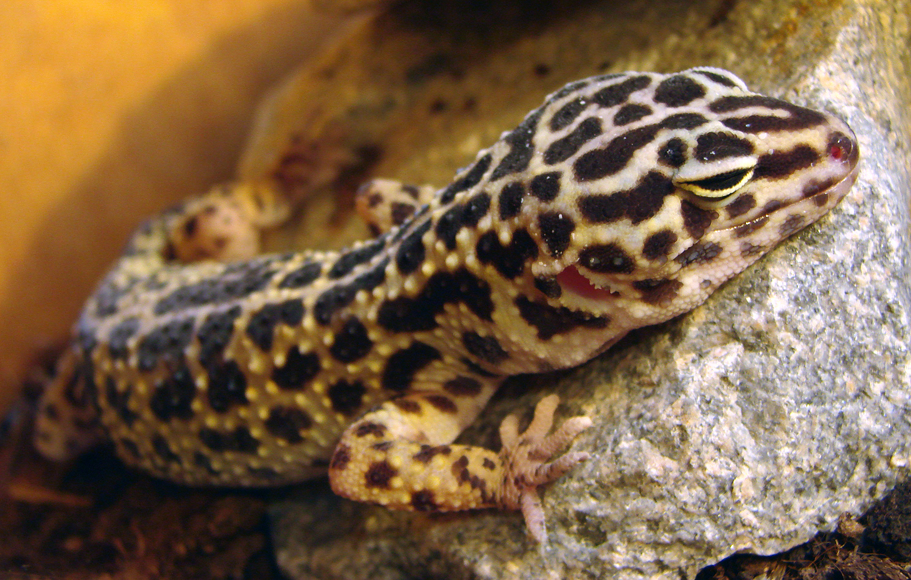 Jeune gecko léopard (Eublepharis macularius). L'Ile aux Serpents, à La Trimouille (86).